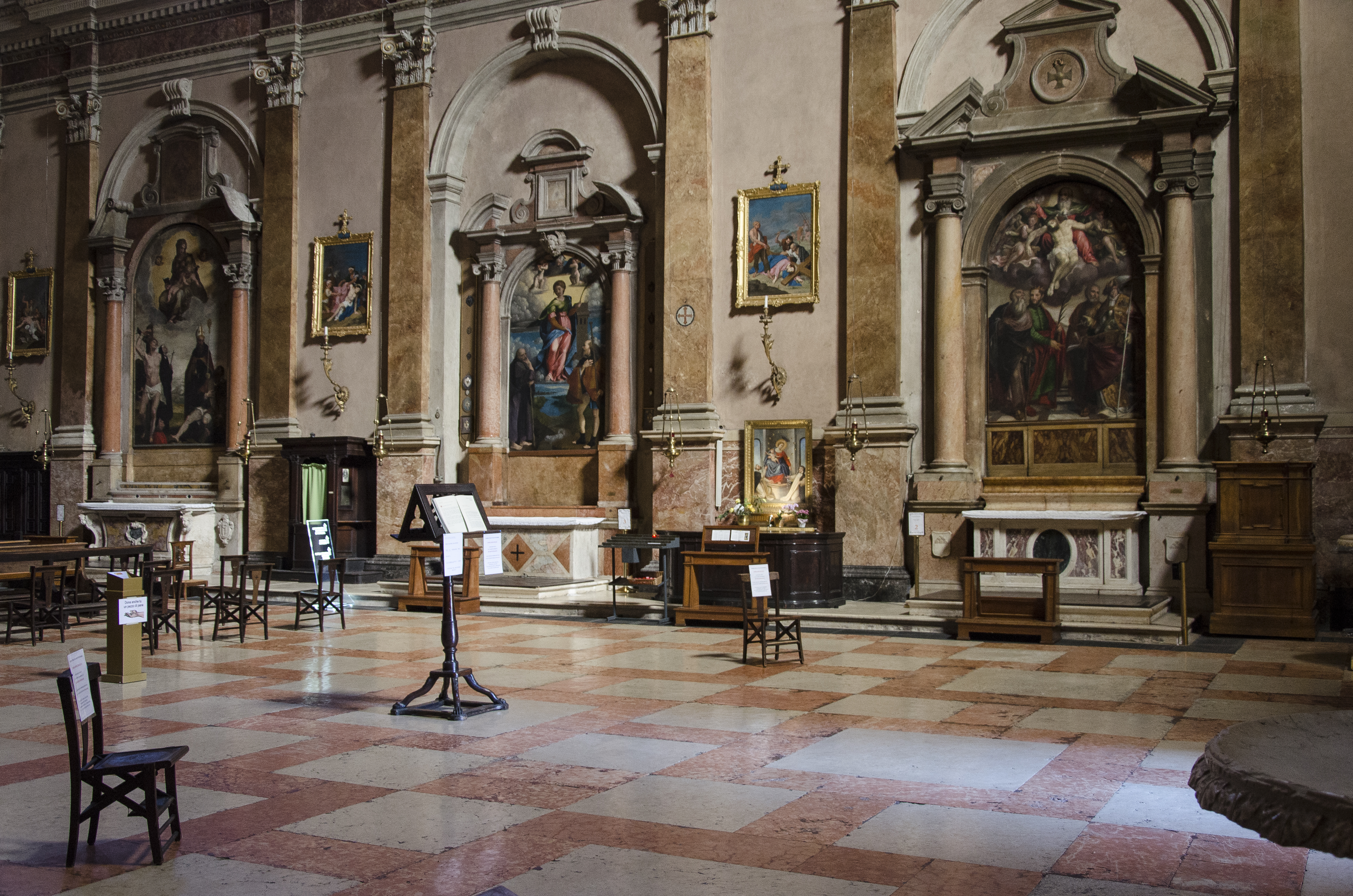 Interno della chiesa di Sant'Eufemia a Verona